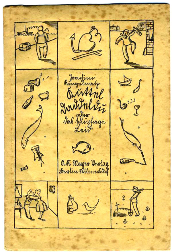 Titelblatt der 2. Auflage des Ringelnatz-Gedichtbuches Kuttel Daddeldu